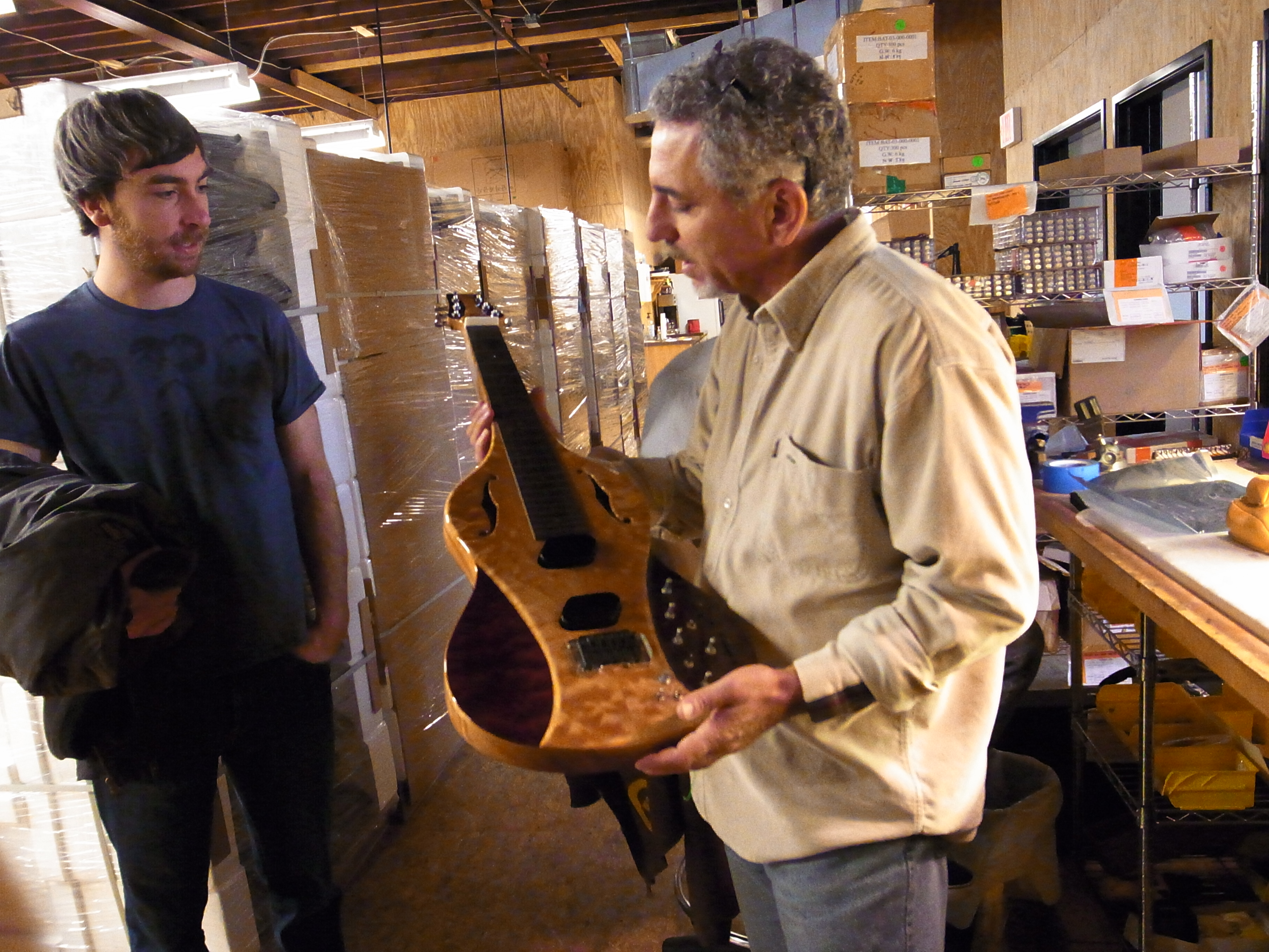 mike adams shows us a moog lap steel